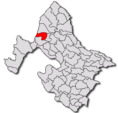 Categorie:Hărţi ale judeţului Mehedinţi